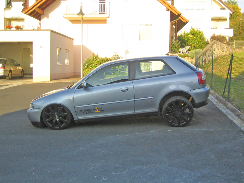 Audi A3 1.8T quattro mit Airride Fahrwerk & KONI Stoßdämpfern